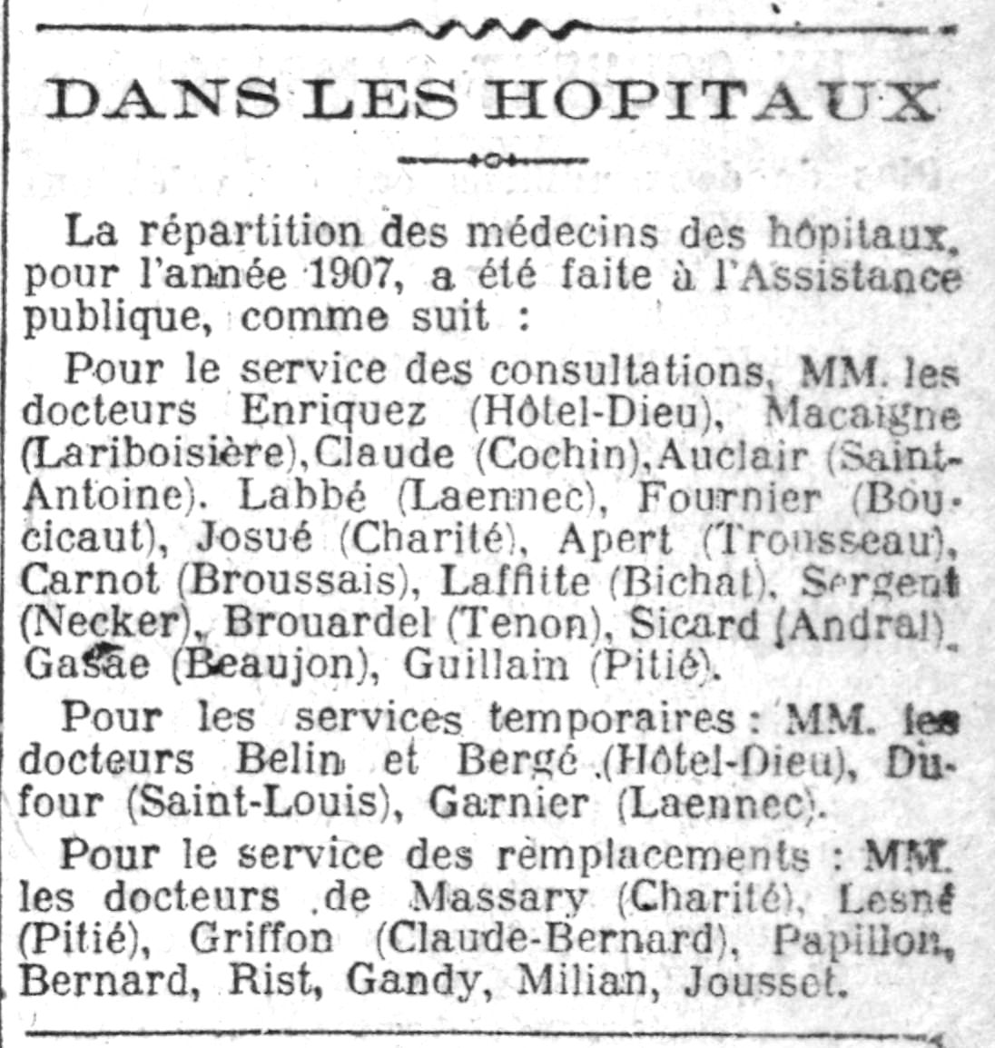 Dans la liste des médecins de l'Assistance publique le docteur André Jousset apparaît à la fin.